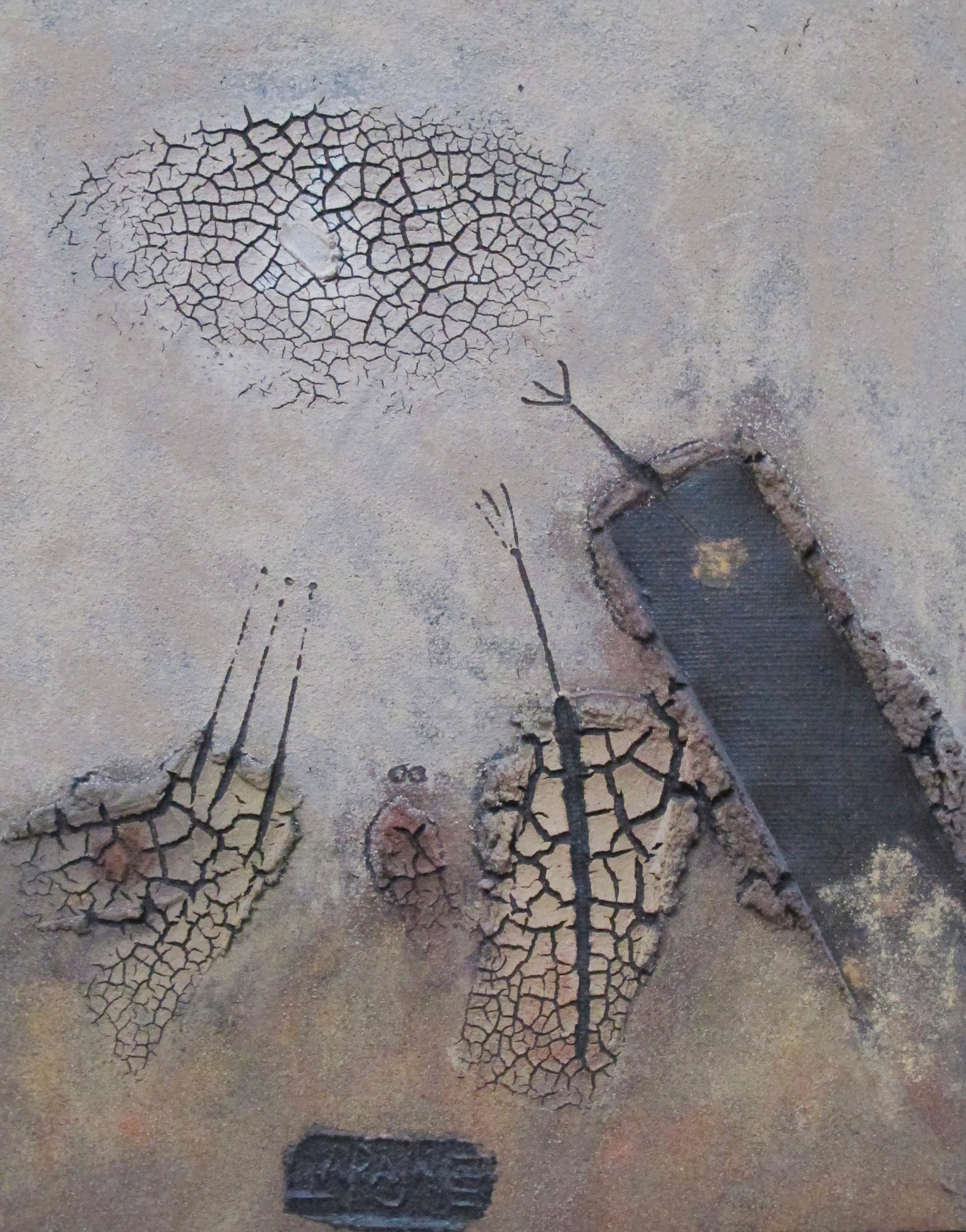 Barjanska slika 1985cca 50x60 zemlja juta